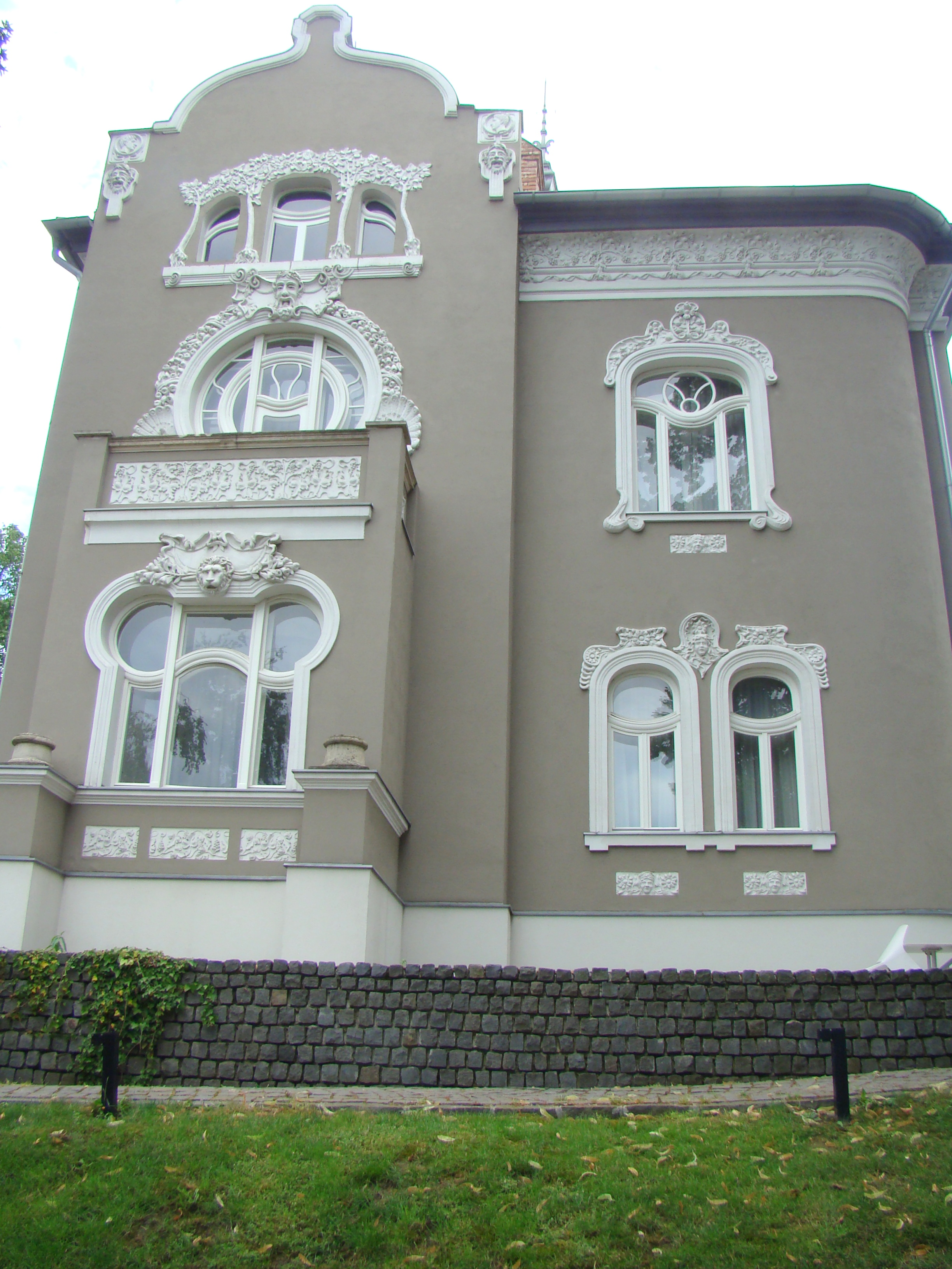 Casa Csonka, municipiul Târgu Mureș, str. Doja Gheorghe 35 1910